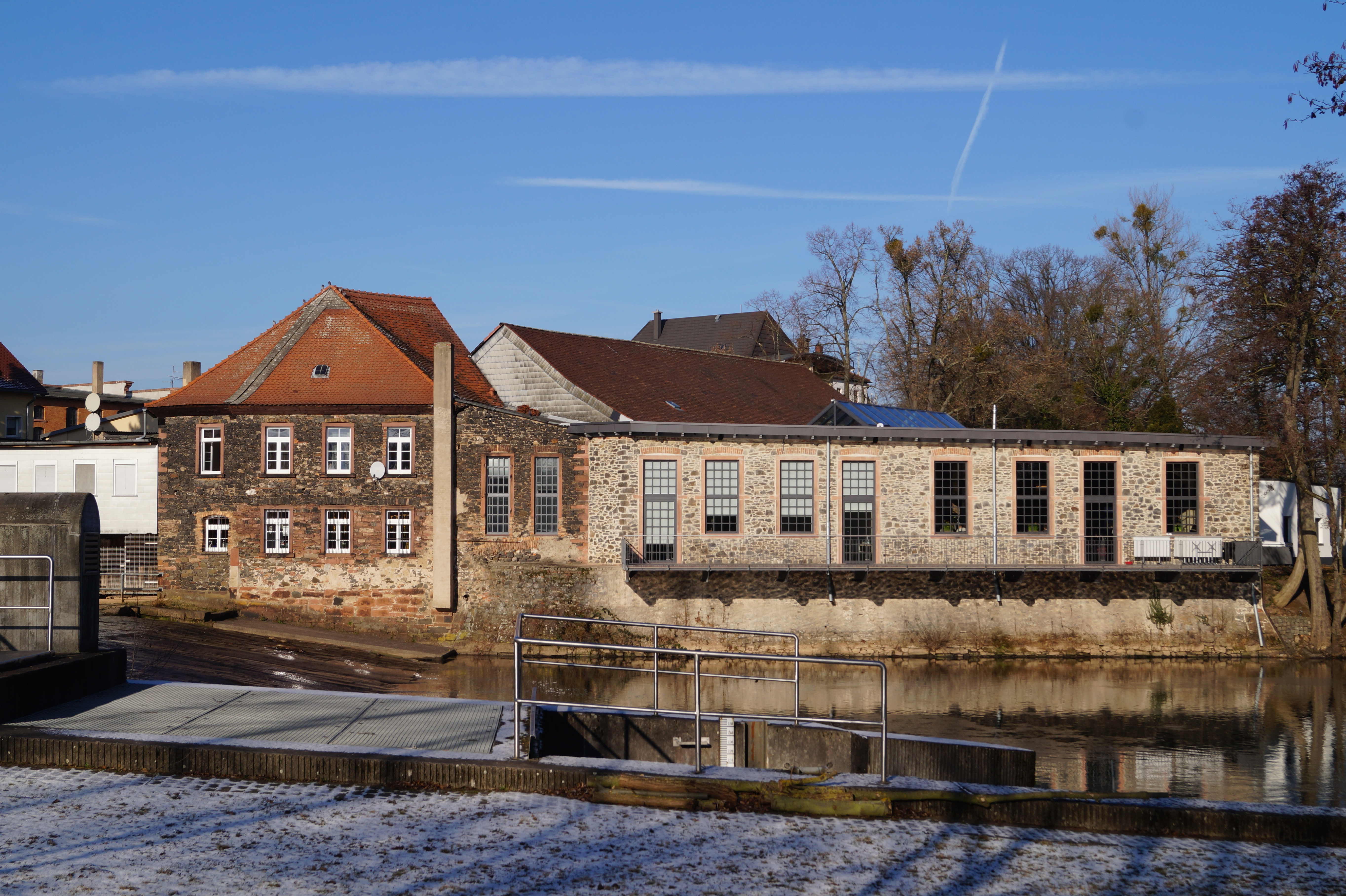 Herrenmühle in Hanau, Ansicht der Flussseite mit Wehr 2017.